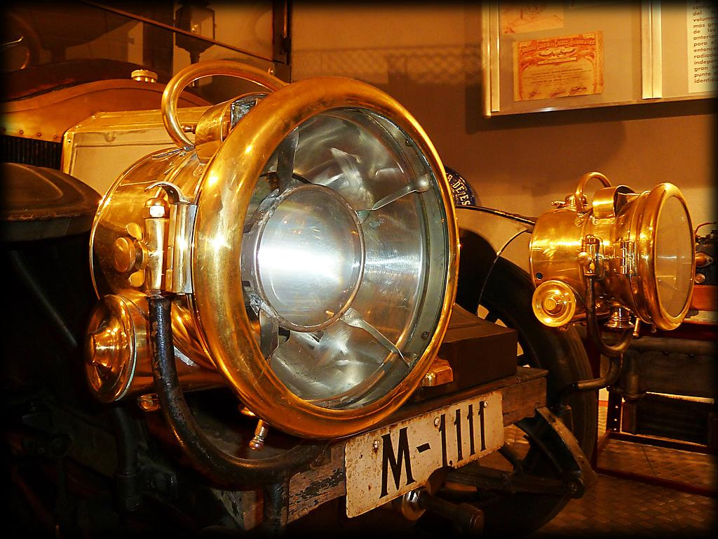 Alumbrar no sé si alumbrarán, pero ... ¿y lo bonitos que son? Museo de Historia de la Automoción de Salamanca Native nameMuseo de Historia de la Automoción (Salamanca)LocationSalamanca, (Spain)Coordinates40° 57′ 29.73″ N, 5° 40′ 00.95″ W Established2002Web page control : Q6034050 institution QS:P195,Q6034050